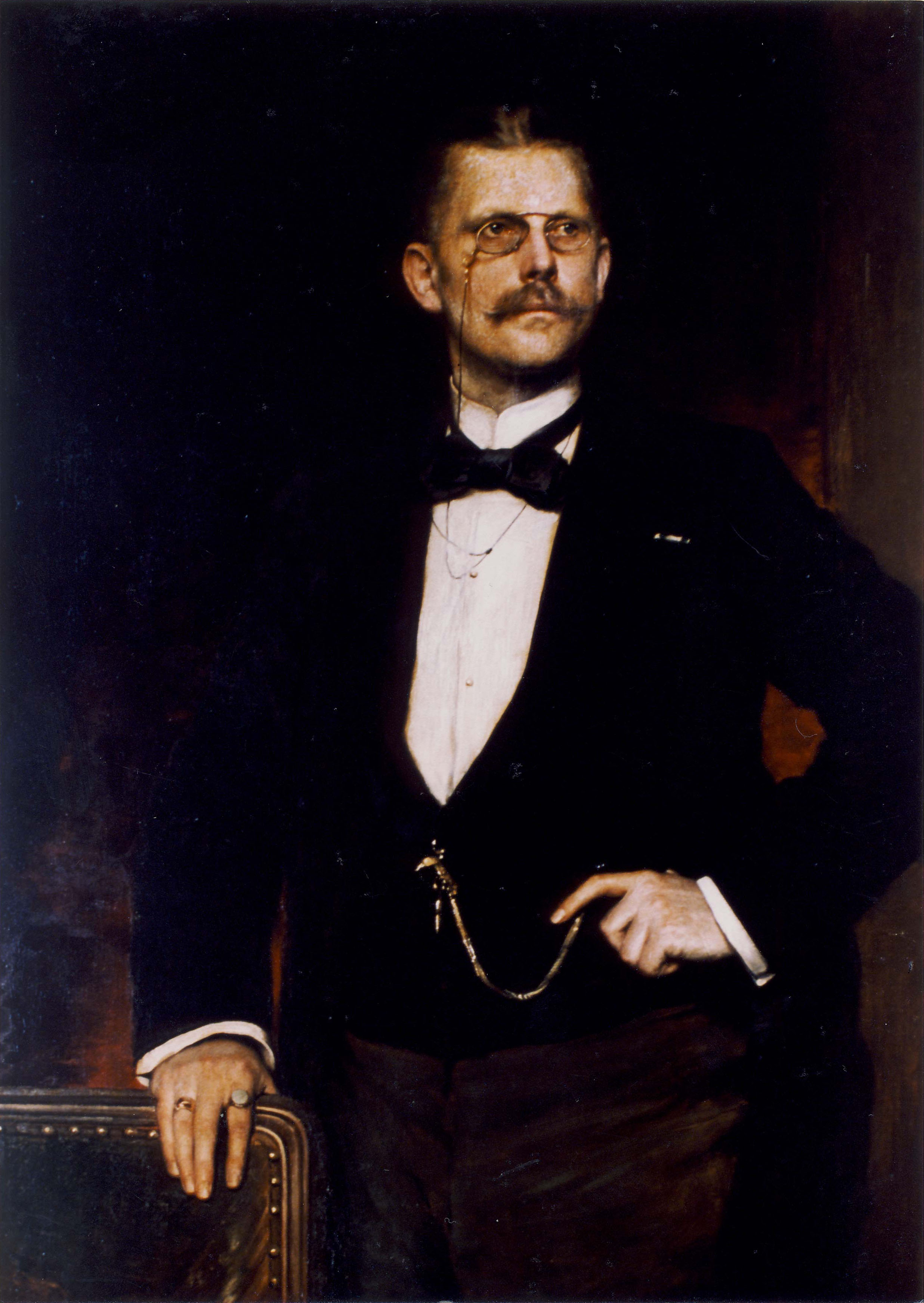 Dr. Gustav Heinrich von Beck (1854-1933), Chemnitzer Oberbürgermeister von 1896 bis 1908